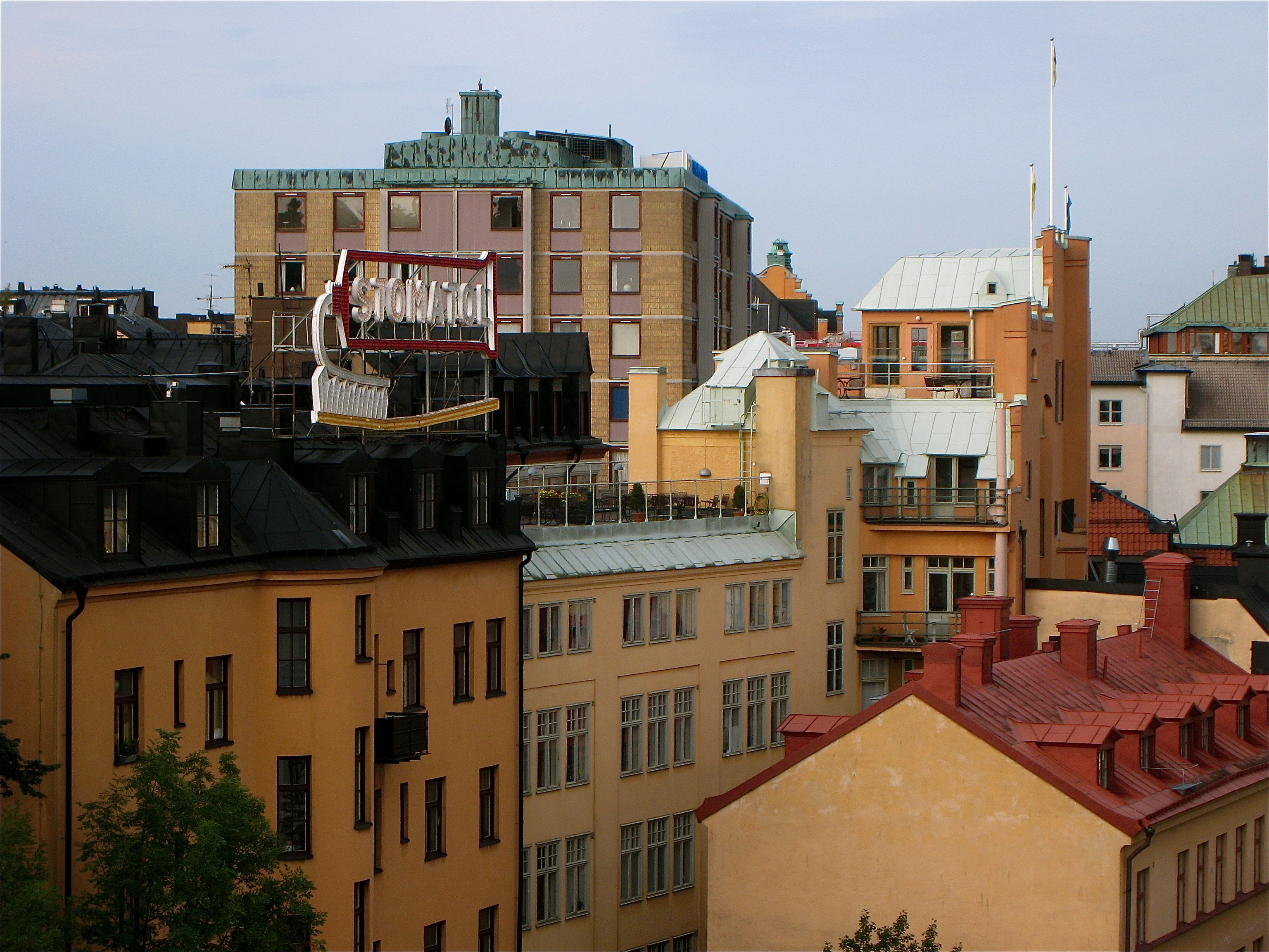 Vy från Katarinahissen mot Urvärdesgränd och Stomatolskylten på Södermalm, Stockholm